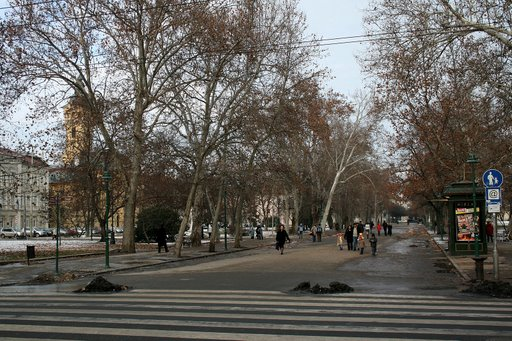 CSquare_of_Széchenyi_Szeged